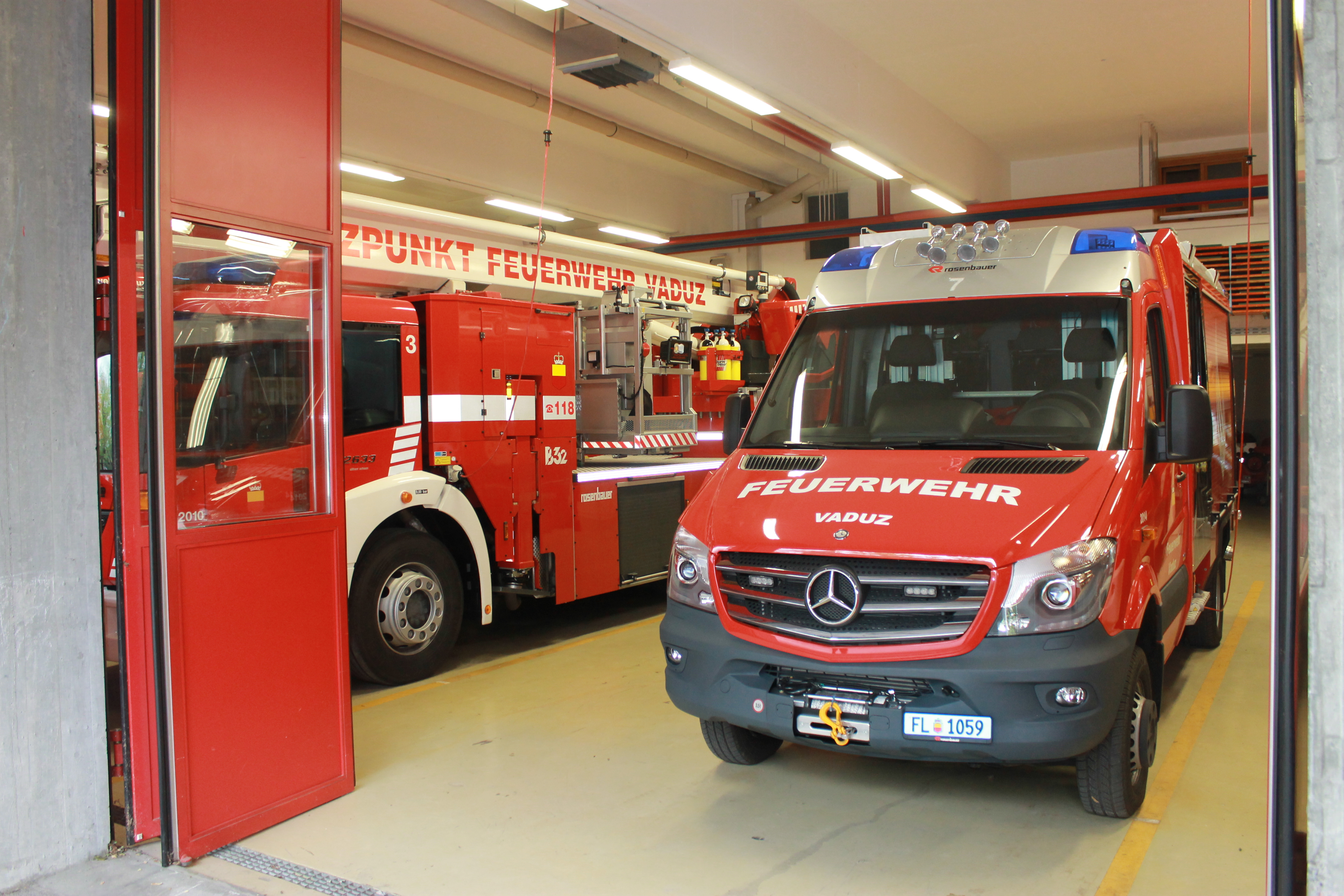 Stützpunkt Feuerwehr Vaduz Fahrzeuge